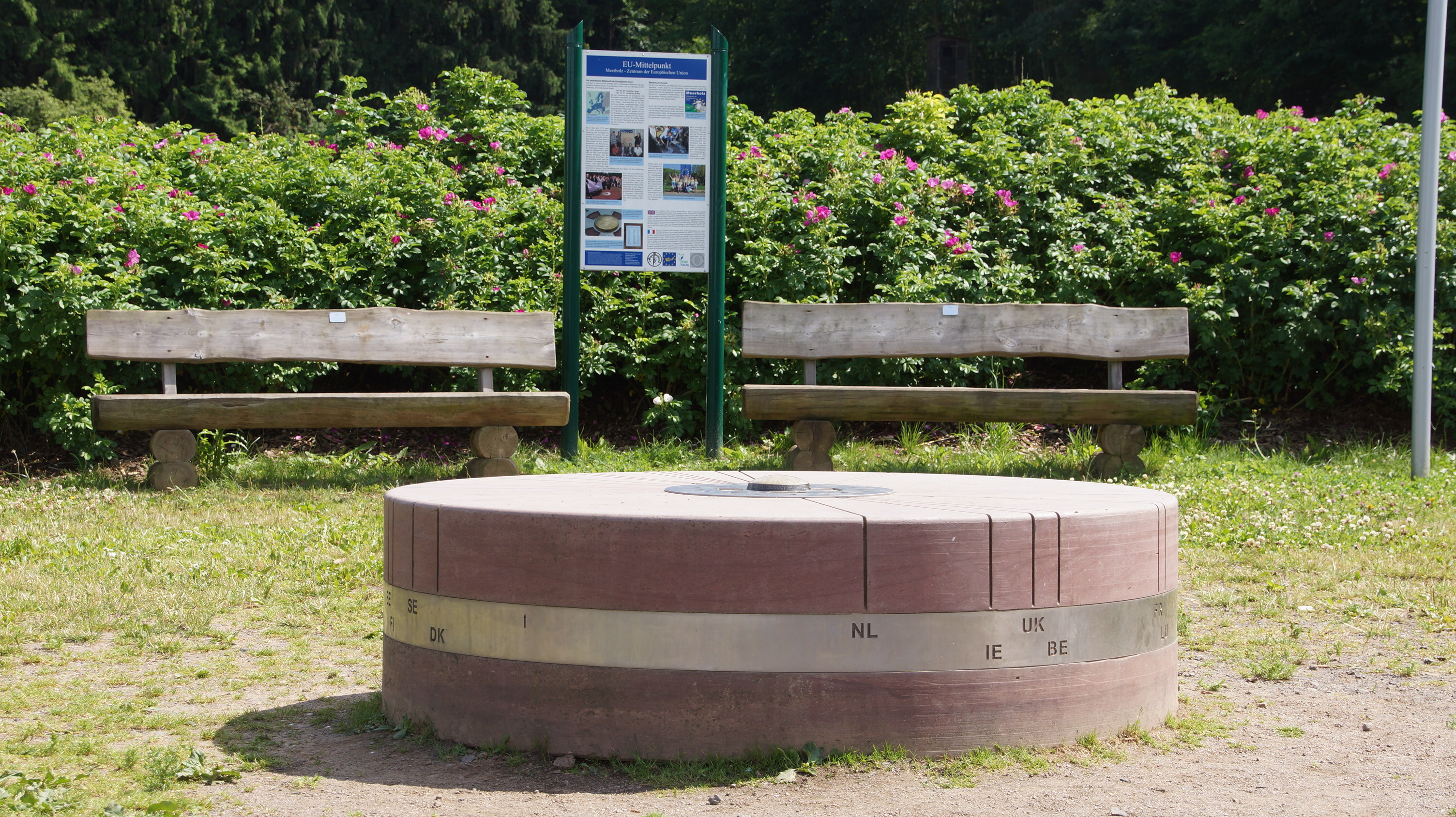 Zwischen der EU-Osterweiterung 2007 und dem Beitritt Kroatiens lag der Mittelpunkt der Europäischen Union in der hessischen Stadt Gelnhausen in Deutschland, im Stadtteil Meerholz. Das Institut Géographique National hatte die genauen Koordinaten ♁50° 10′ 21″ N, 9° 9′ 0″ O berechnet.